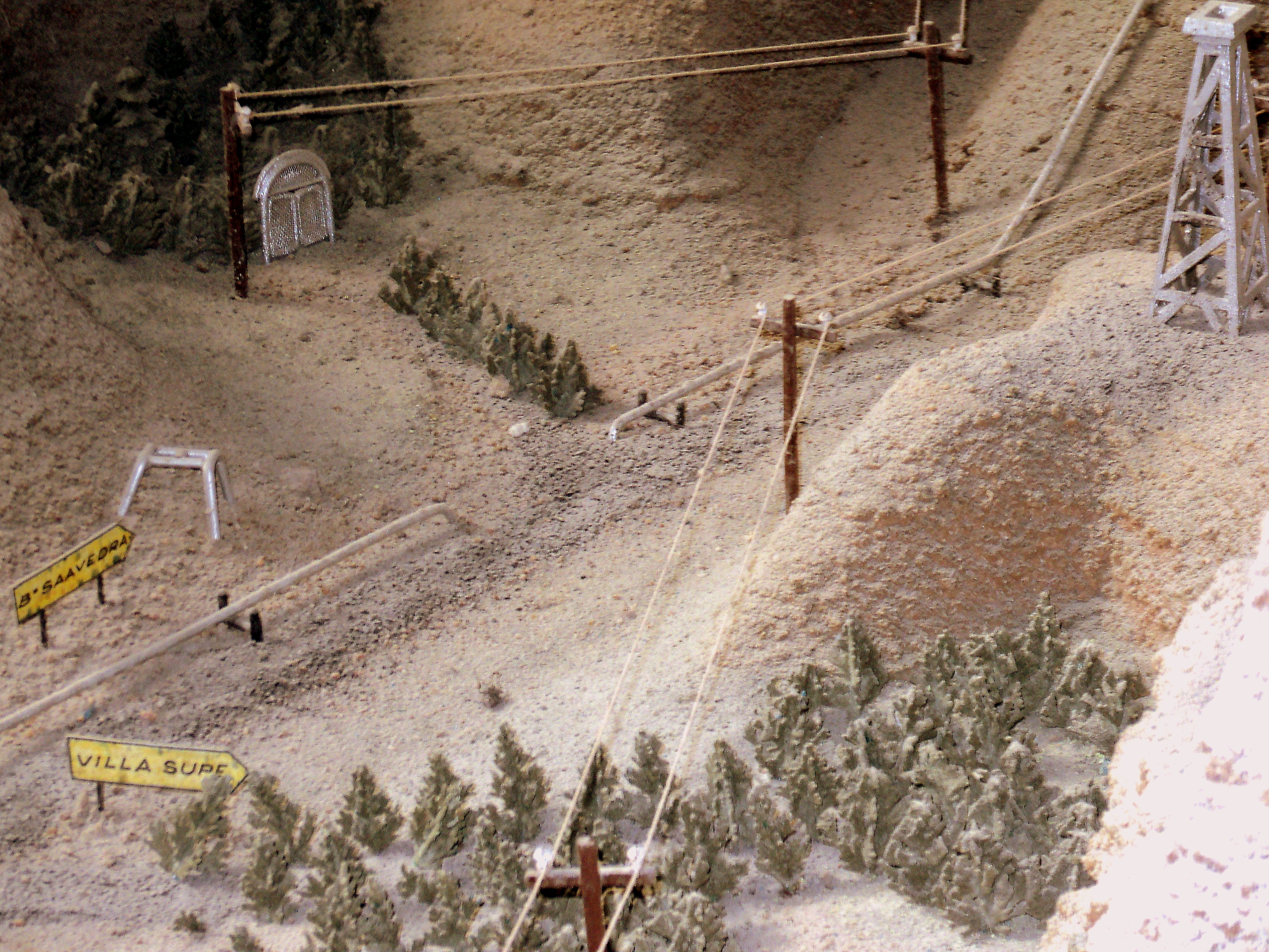 Maqueta de Villa SUPE que la ubica proxima a Saavedra